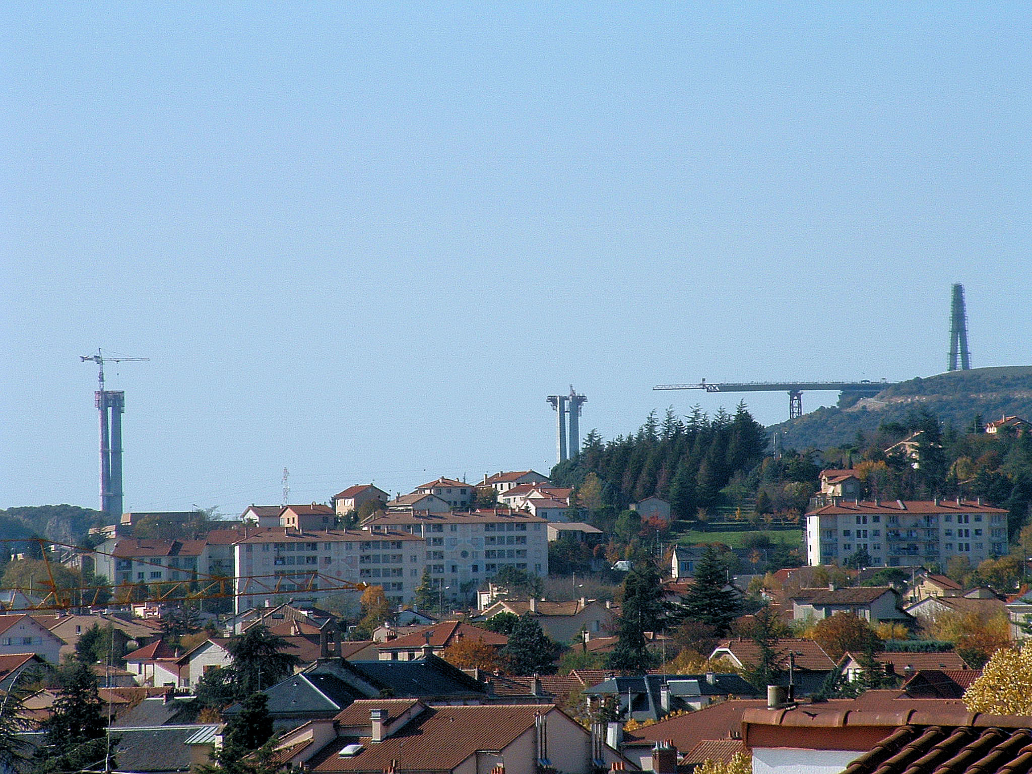 Viaduc de Millau (construction) - Début du lancement de la charpente métallique côté nord